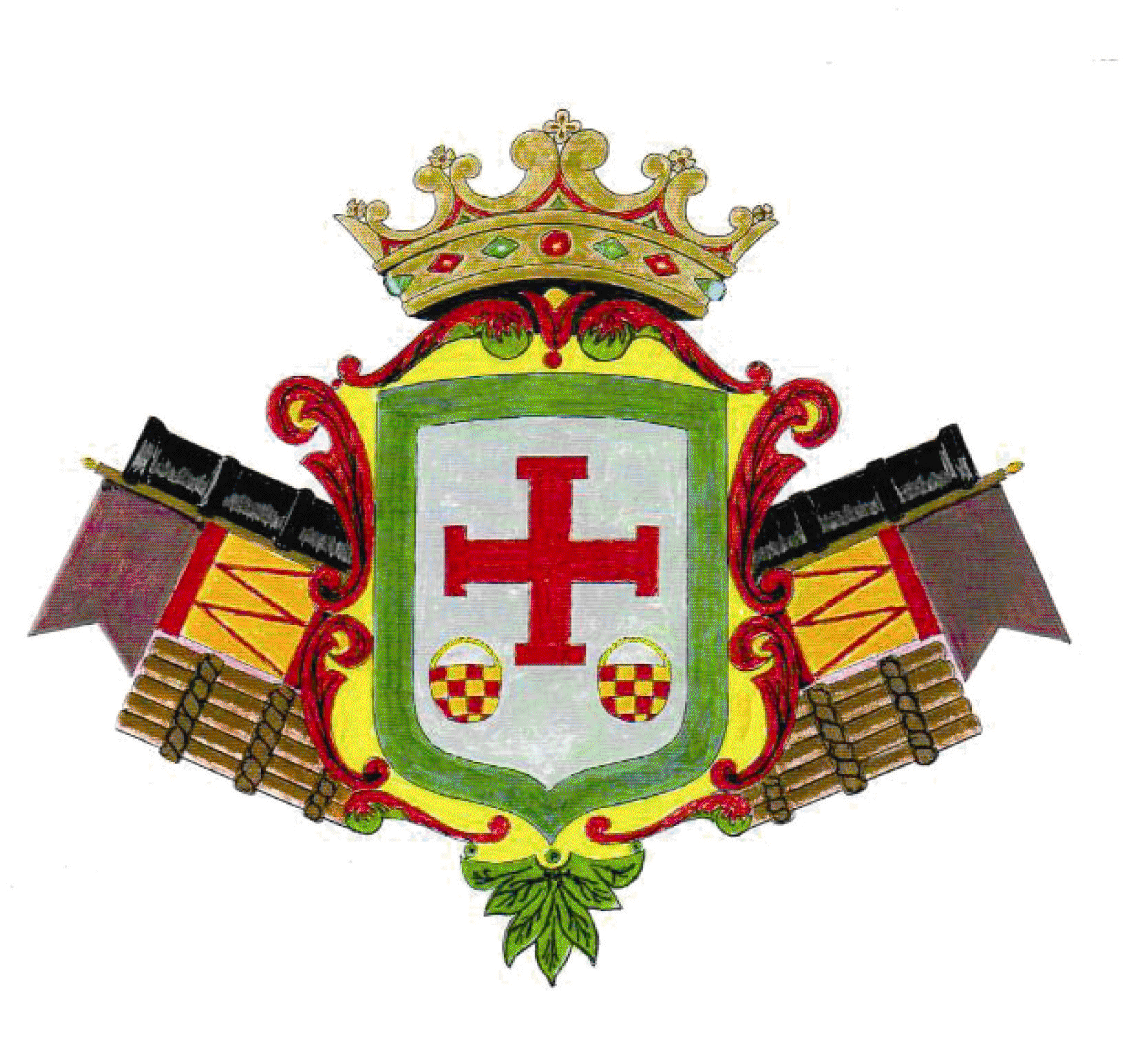 escudo Sisante, Cuenca (España)